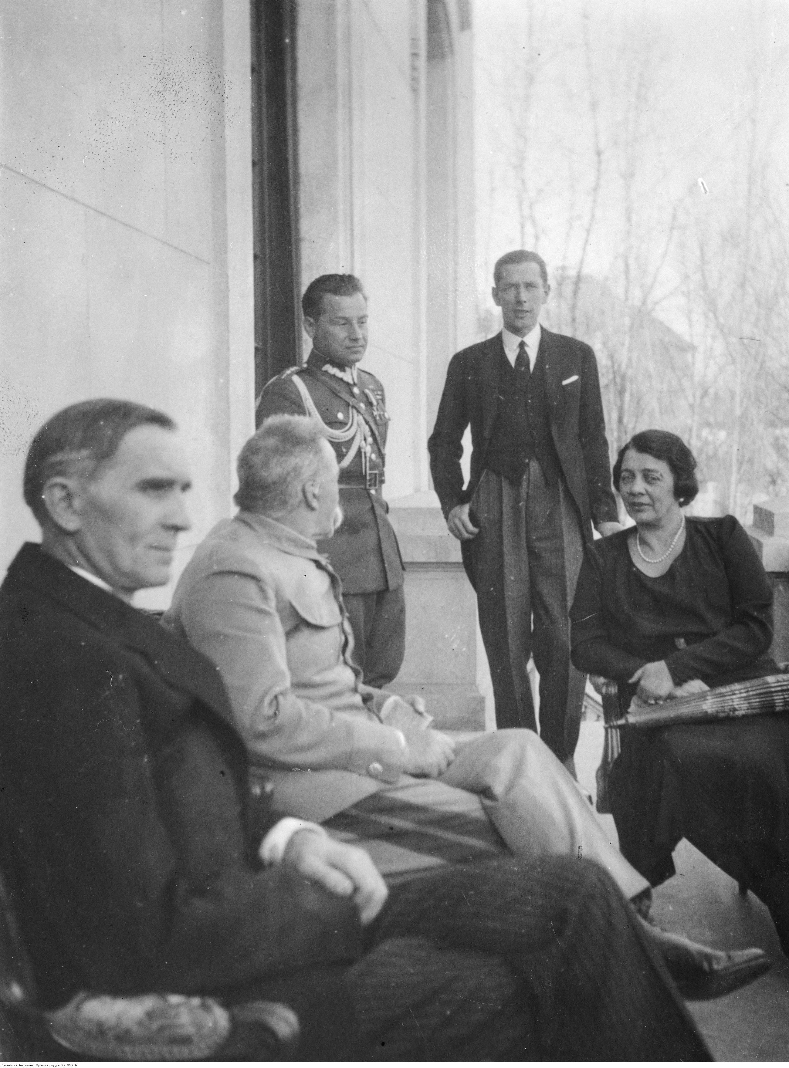 Marszałek Józef Piłsudski w Bukareszcie. Od lewej widoczni: dr Lucjan Skupiewski, Józef Piłsudski, kpt. Mieczysław Lepecki, radca Tadeusz Kobylański, Izabela Szembek.